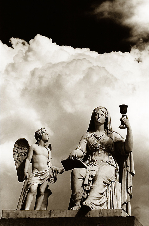 Augusto De Luca - foto della Gran Madre di Dio, Torino